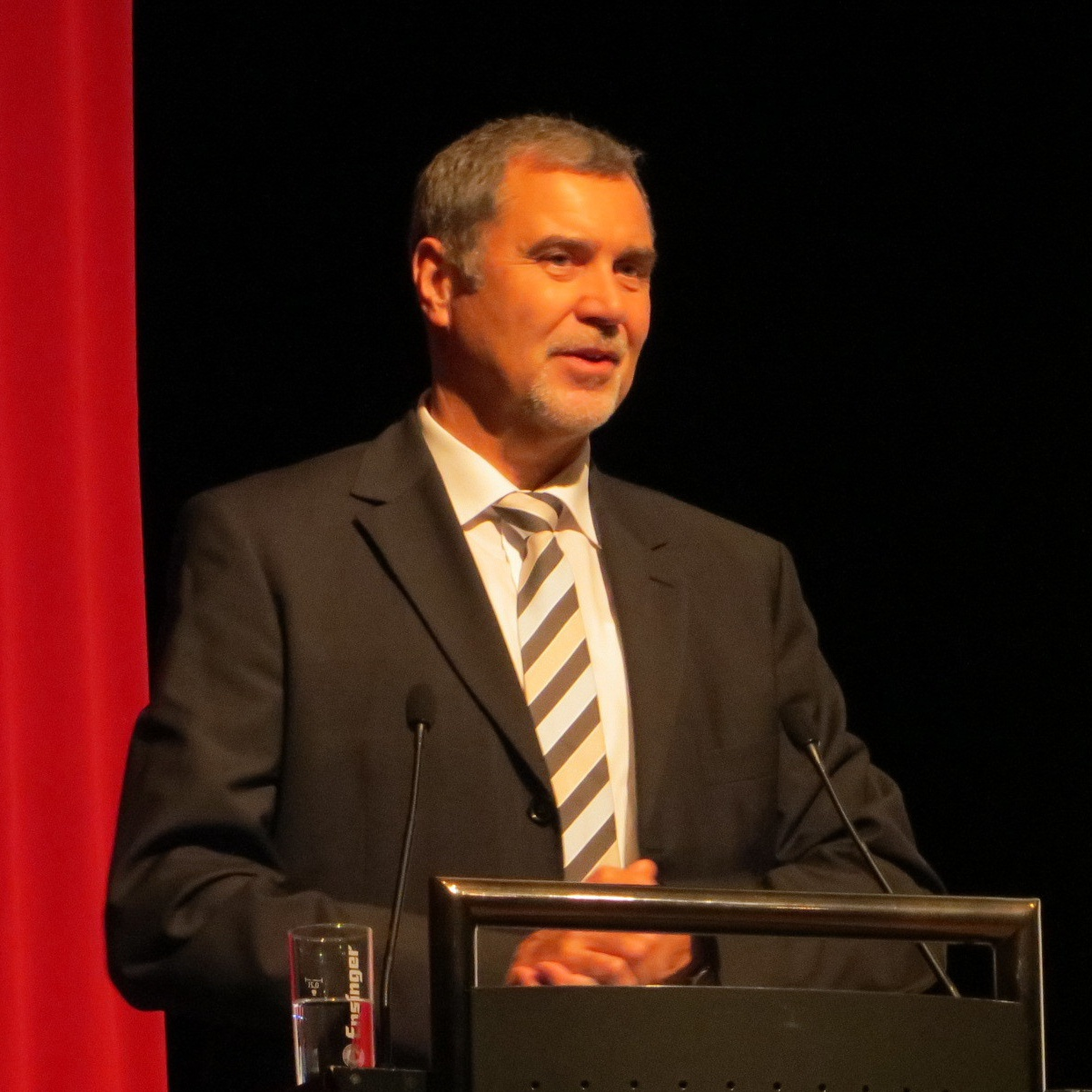 Detlef Piepenburg, Landrat des Landkreises Heilbronn, bei einer Geschichtsveranstaltung des Landkreises in der Stadthalle in Lauffen am Neckar